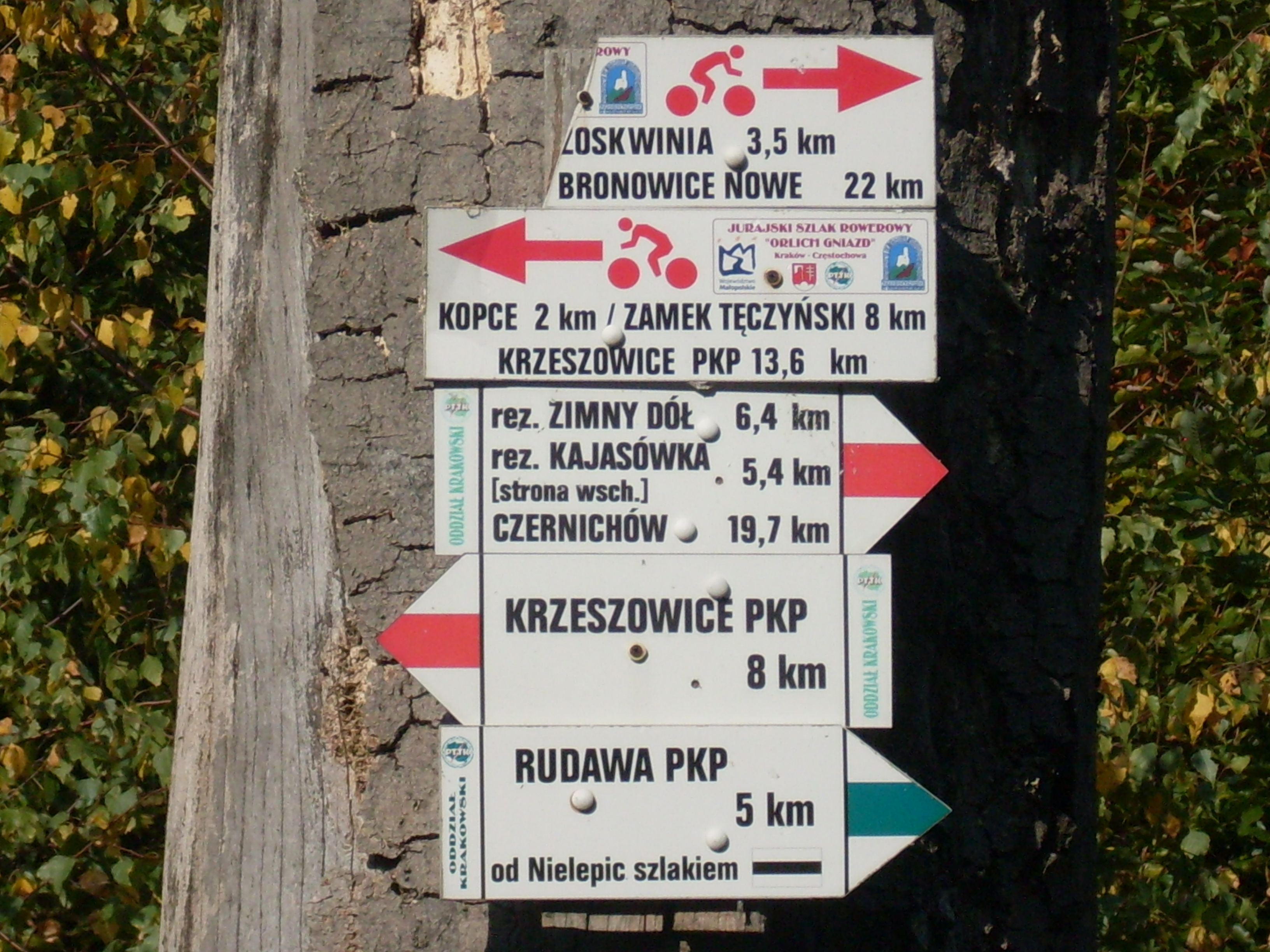 Węzeł szlaków na szczycie Bukowej Góry (Grzbiet Tenczyński)